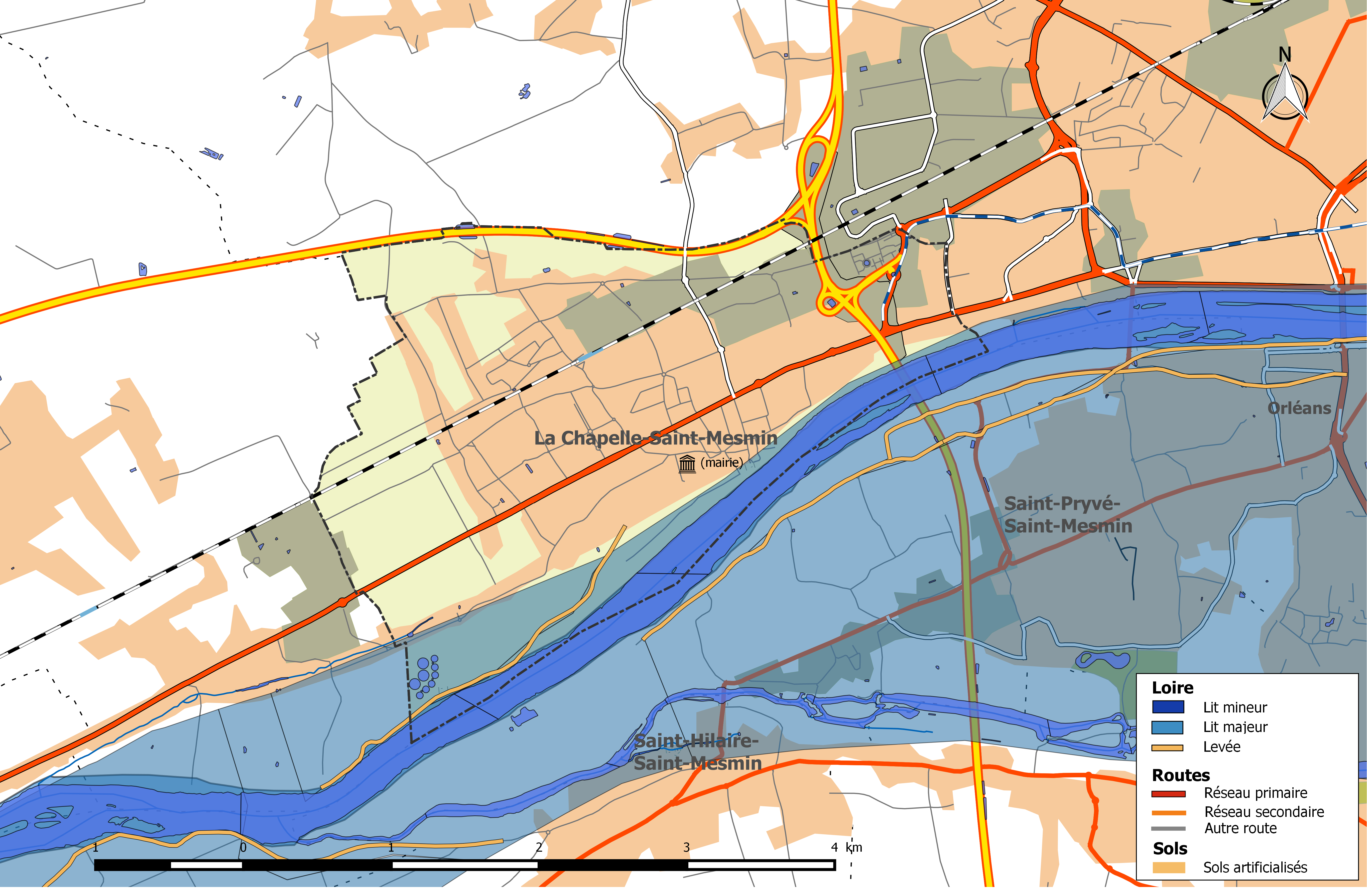 Zone inondable et réseaux hydrographique et routier de la commune de La Chapelle-Saint-Mesmin.